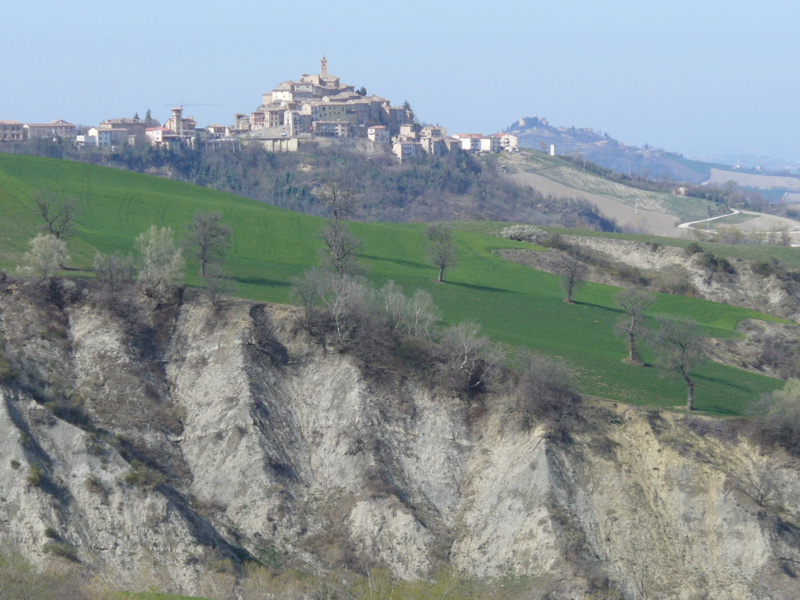 Vista generale del paese di Force (AP), Italy